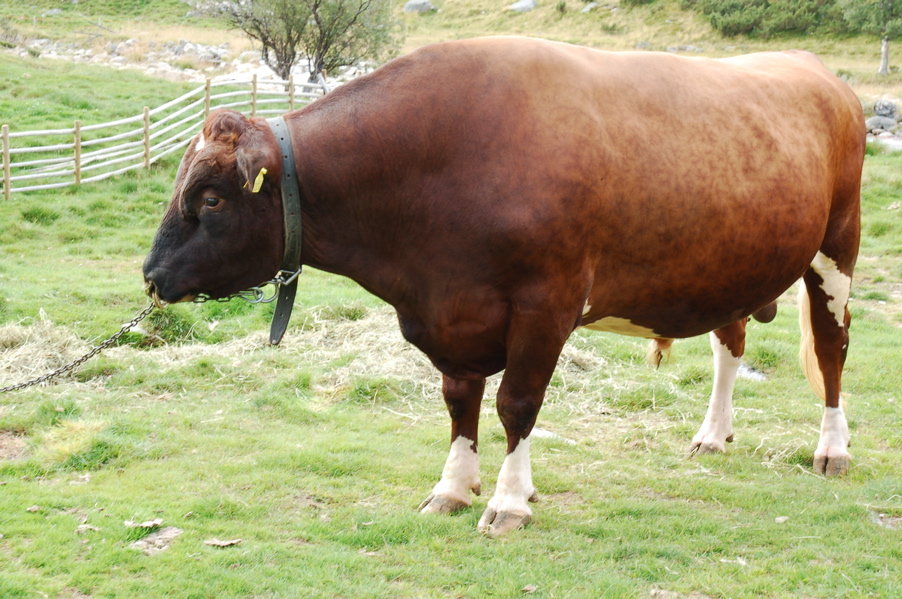 "Samson" NRF (Norsk Rødt Fe) Bull, Rausjødalen Setermeieri, Tolga, Hedmark, Norway, Summer 2006